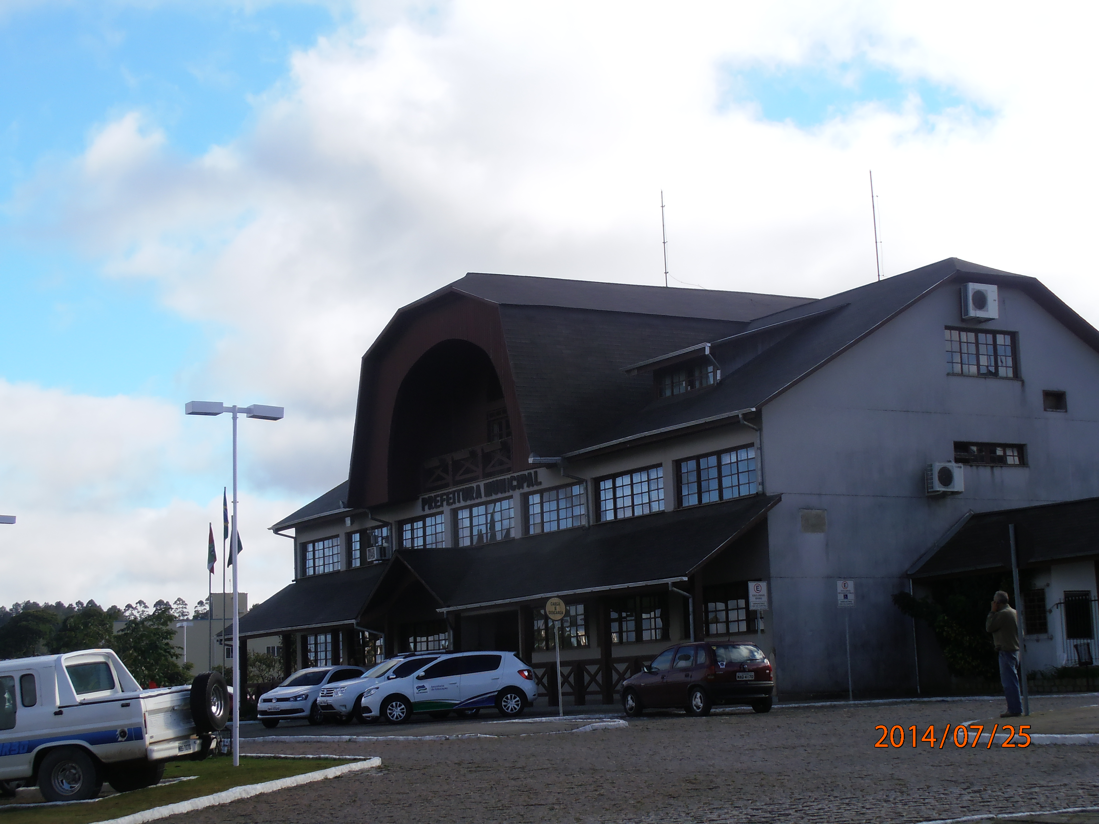 Rio Negrinho SC Brasil - Prefeitura